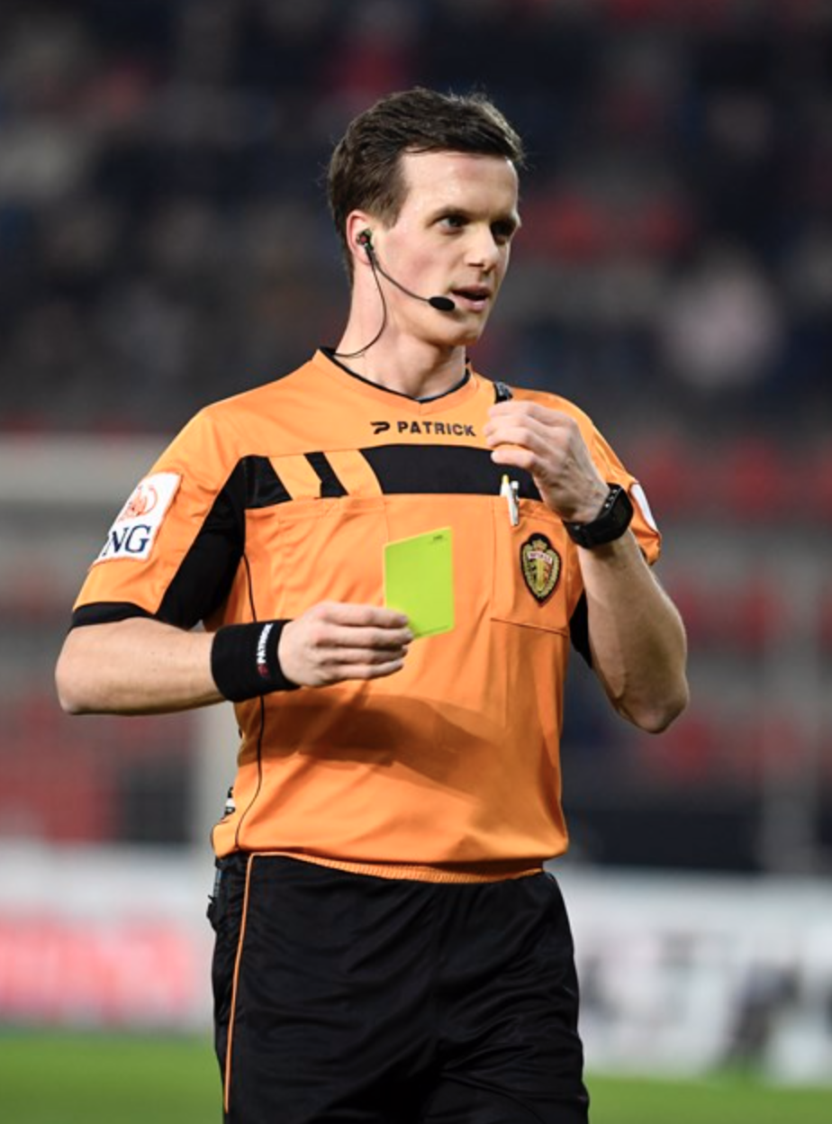 Scheidsrechter Kevin Van Damme